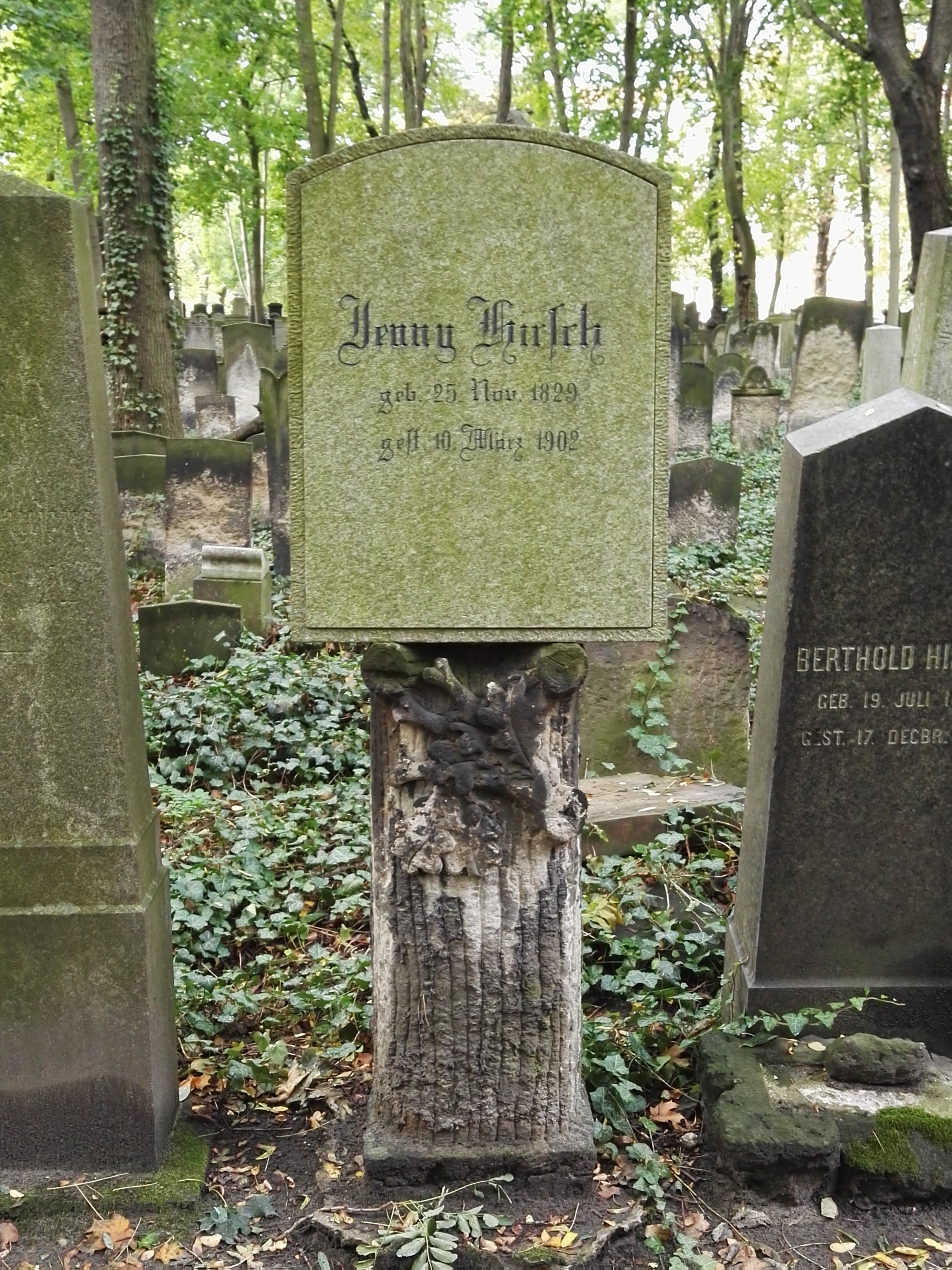 Grab von Jenny Hirsch auf dem Jüdischen Friedhof Schönhauser Allee